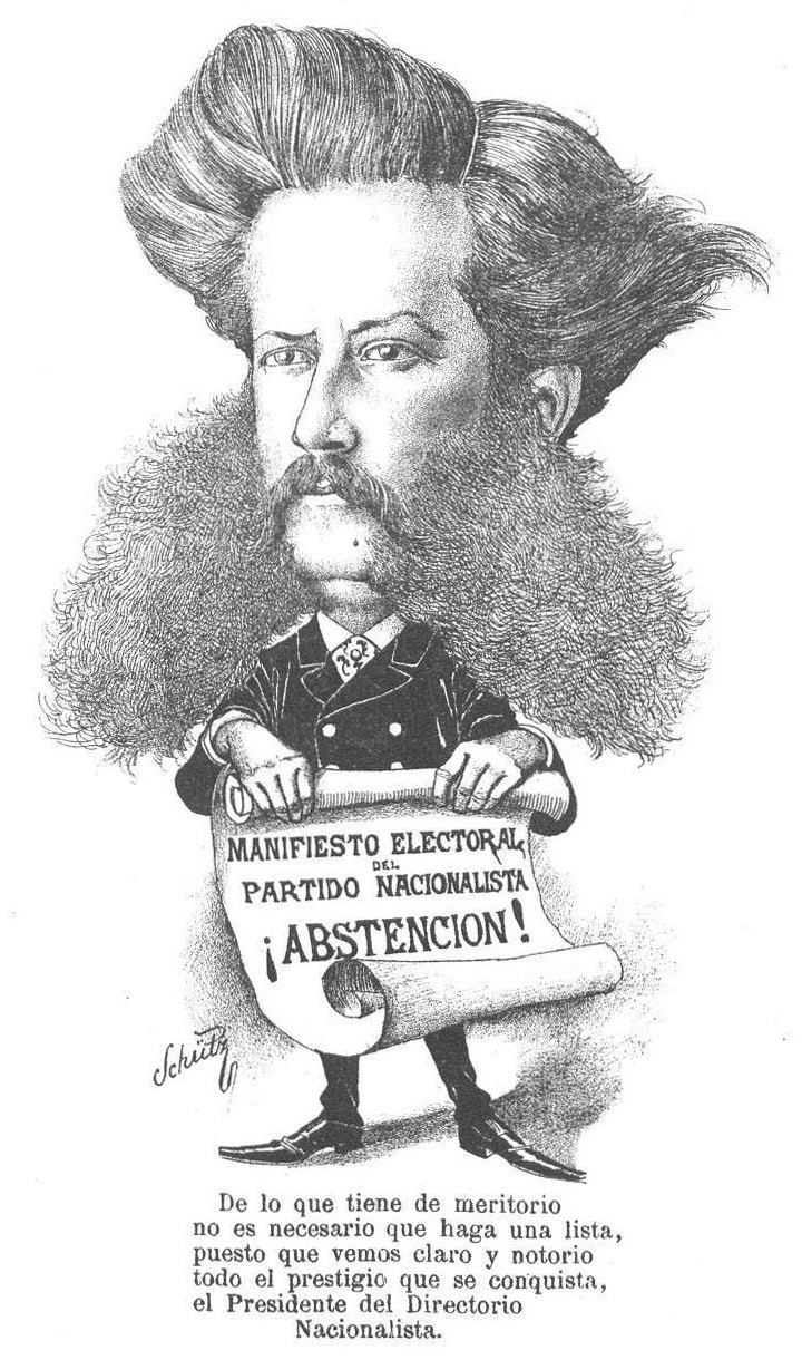 Caricatura de Juan José de Herrera por Charles Schütz